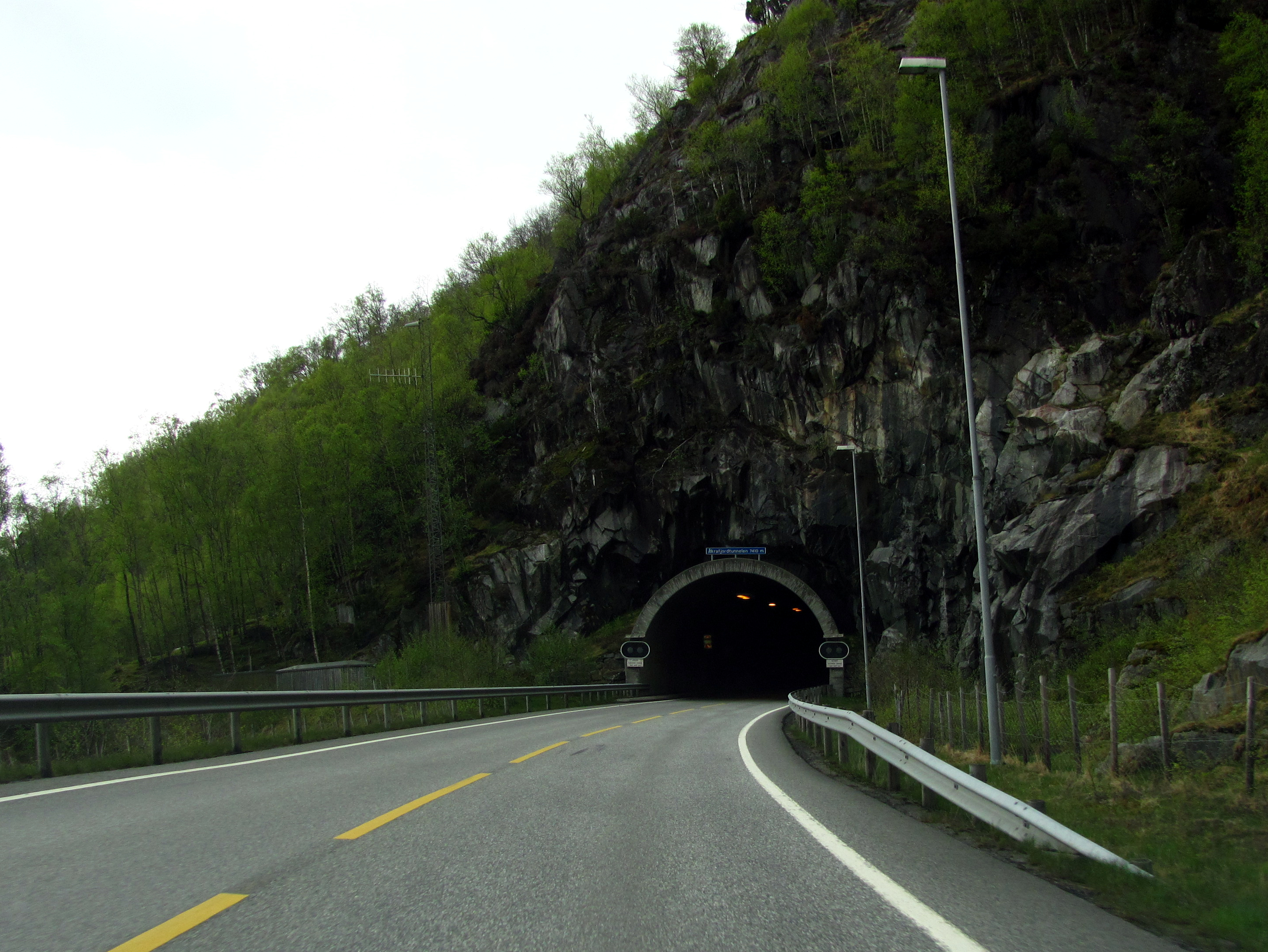 Åkrafjordtunnelen på europavei 134 i Etne kommune i Hordaland. Tunnelen går mellom Teigland og Sævareid, og avløste et svingete veiparti langs Åkrafjorden. Tunnelen er 7404 meter lang, og den ble åpnet 15. juli 2000.